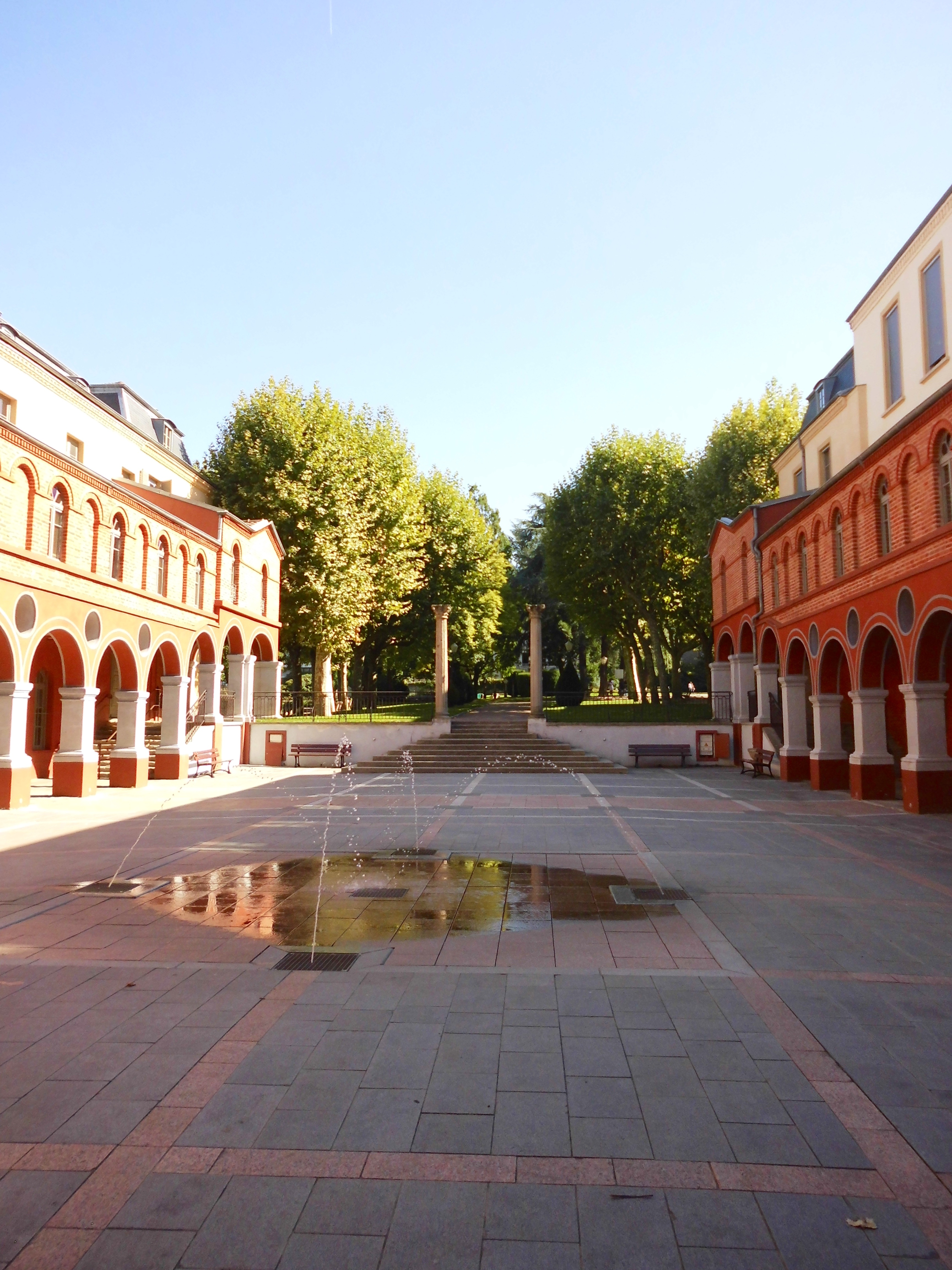 Saint-Chamond (Loire), cour de la Mairie, ancien couvent des Minimes, 26 août 2015 16 h 30.